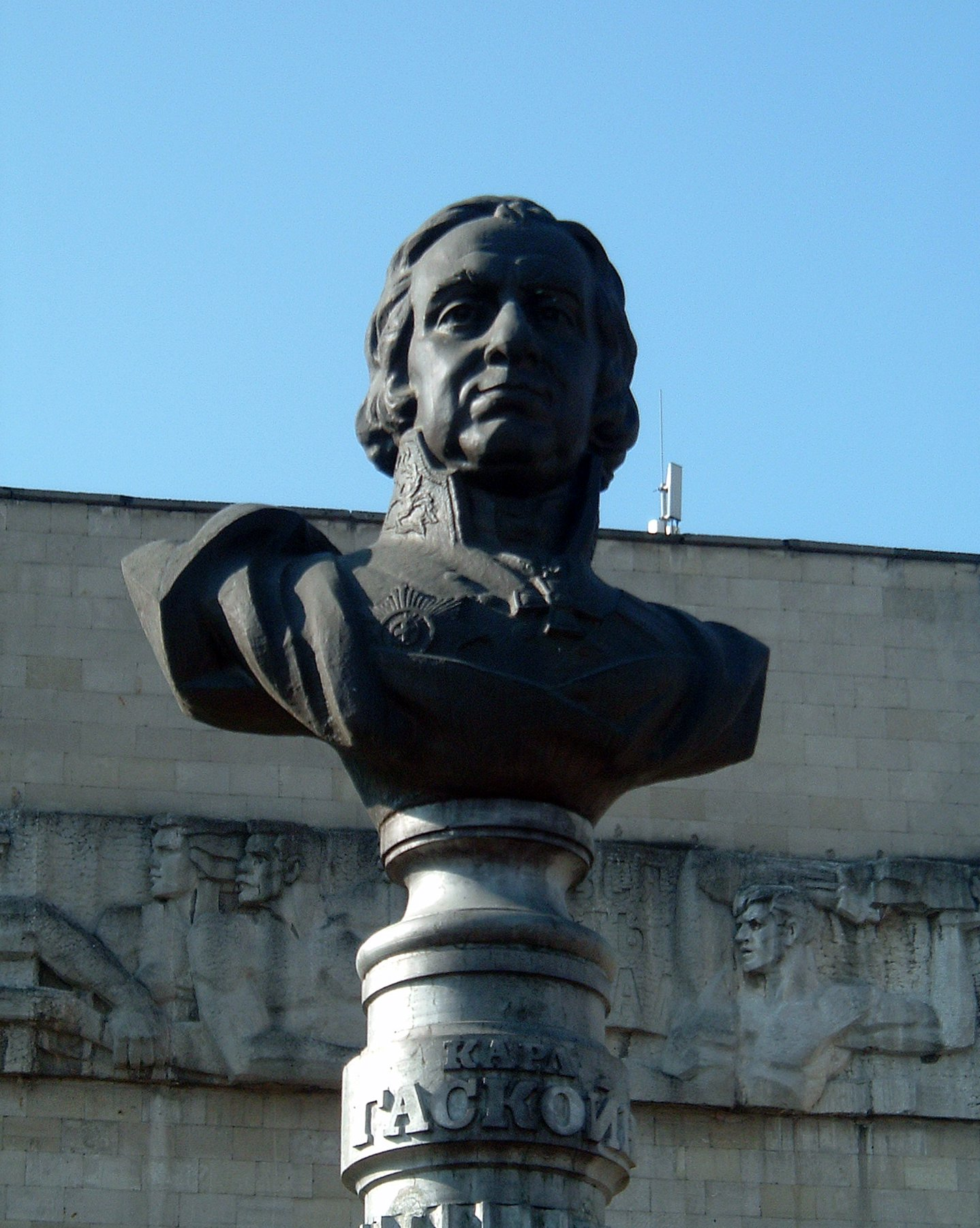 Description RU: Карл Гаскойн Description RU: 1790 - Приглашенному на российскую службу шотландскому инженеру Карлу Гаскойну поручено провести залежей руд и каменного угля в районе Славяносербии (район г. Луганска). Гаскойн выполнил поручение и заверил правительство, что "найденные прииски железной руды и каменного угля по освидетельствованию обещают богатейшее количество сих минералов в наилучшем качестве" Location: Lugansk, Ukraine Date: 4/5/2005 Author: Alex Chupryna License: GFDL